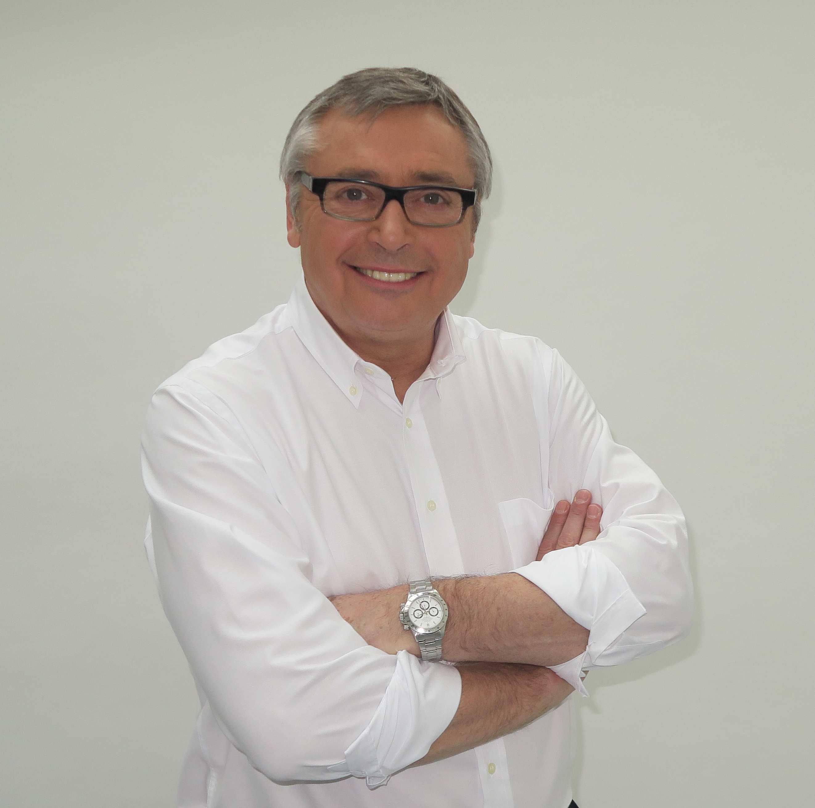 Michael Robinson, foto para Wikipedia